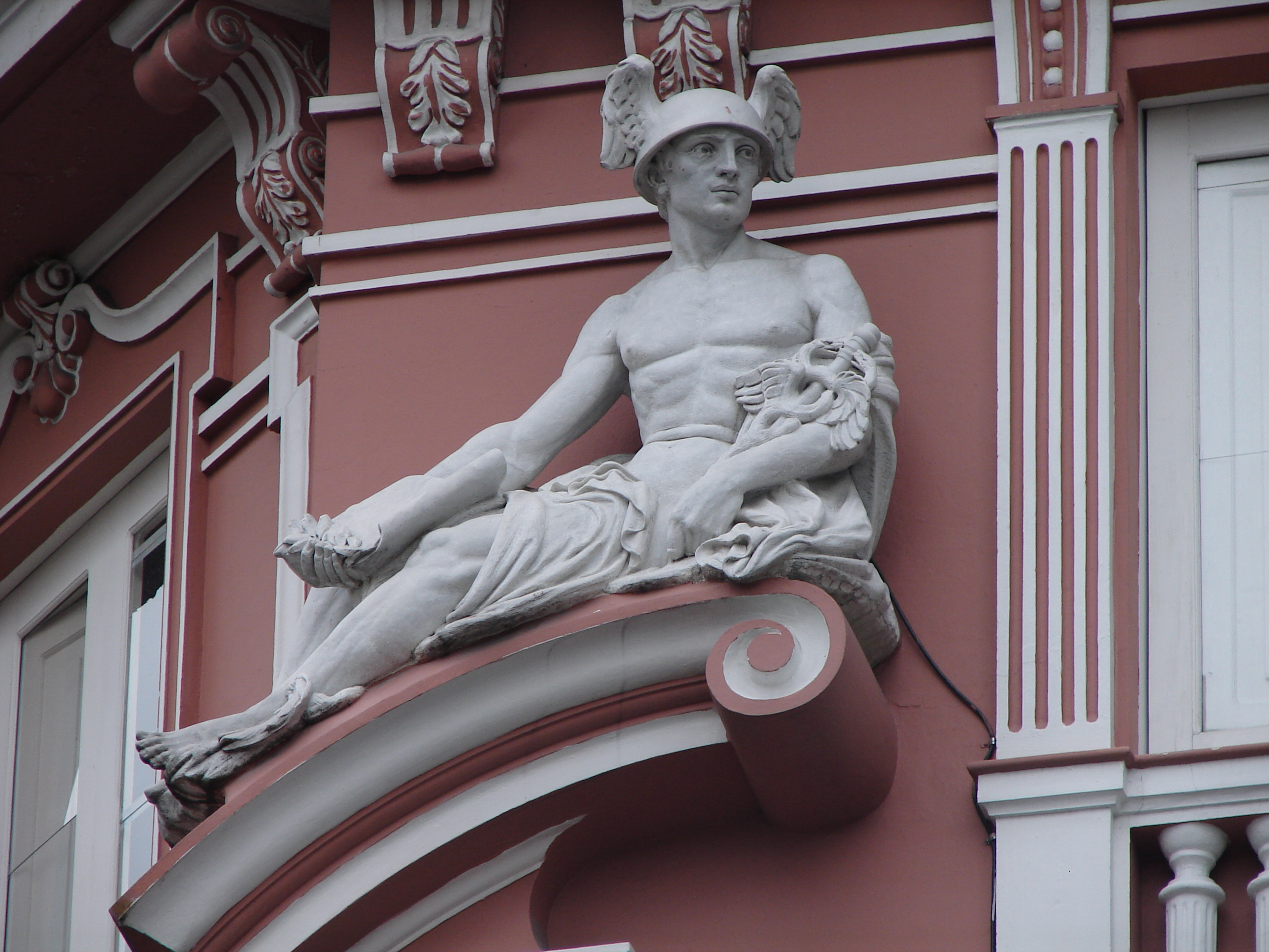 Antiguo Hotel Europa